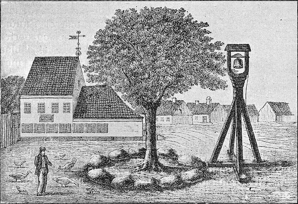 Valby Kro med byklokken fra midten af 1800-tallet.